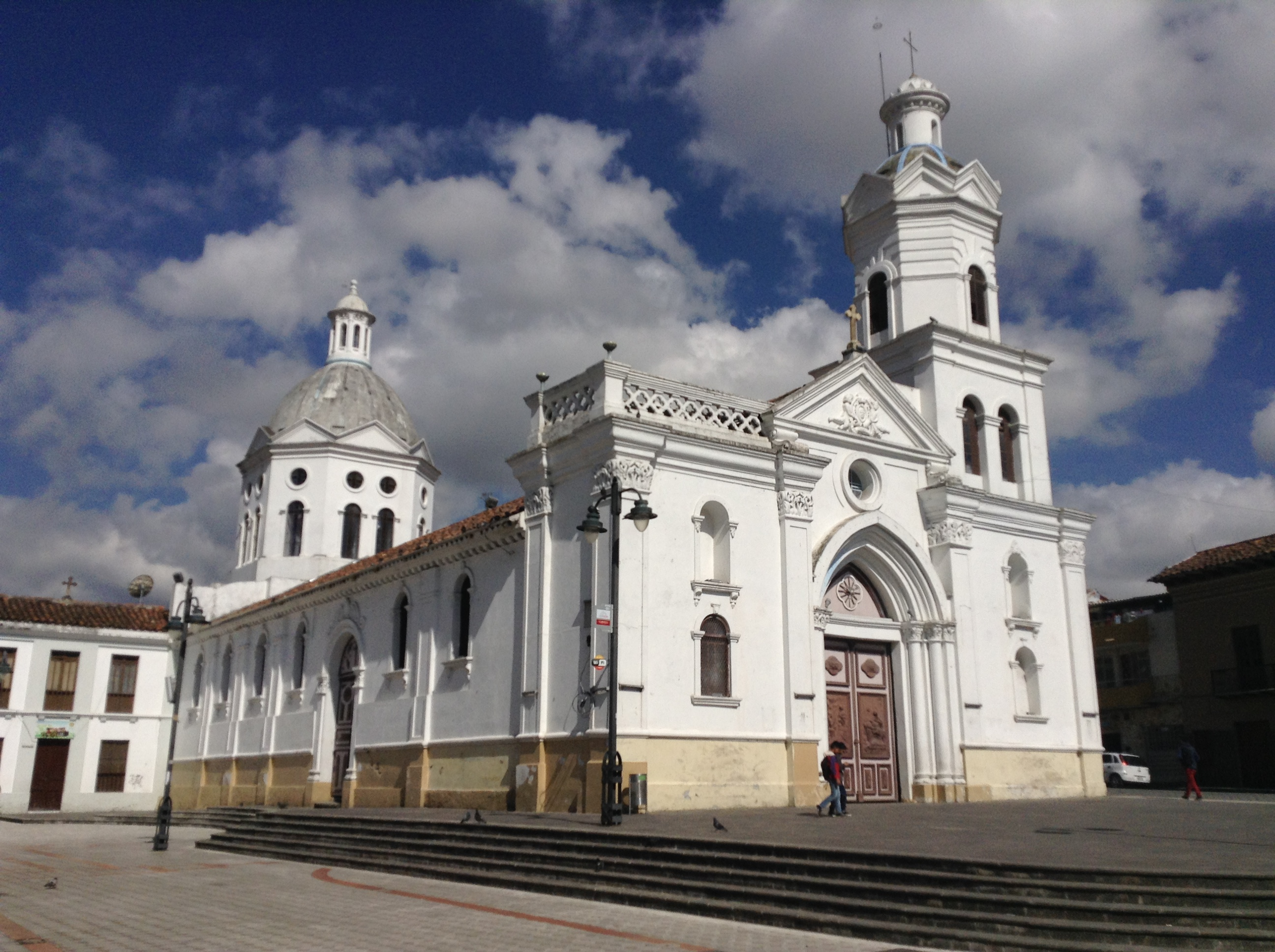 Iglesia de San Sebastián, Cuenca Ecuador